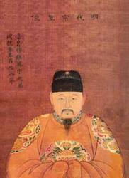 明代宗真像，似出自《乾隆年制历代帝王像》